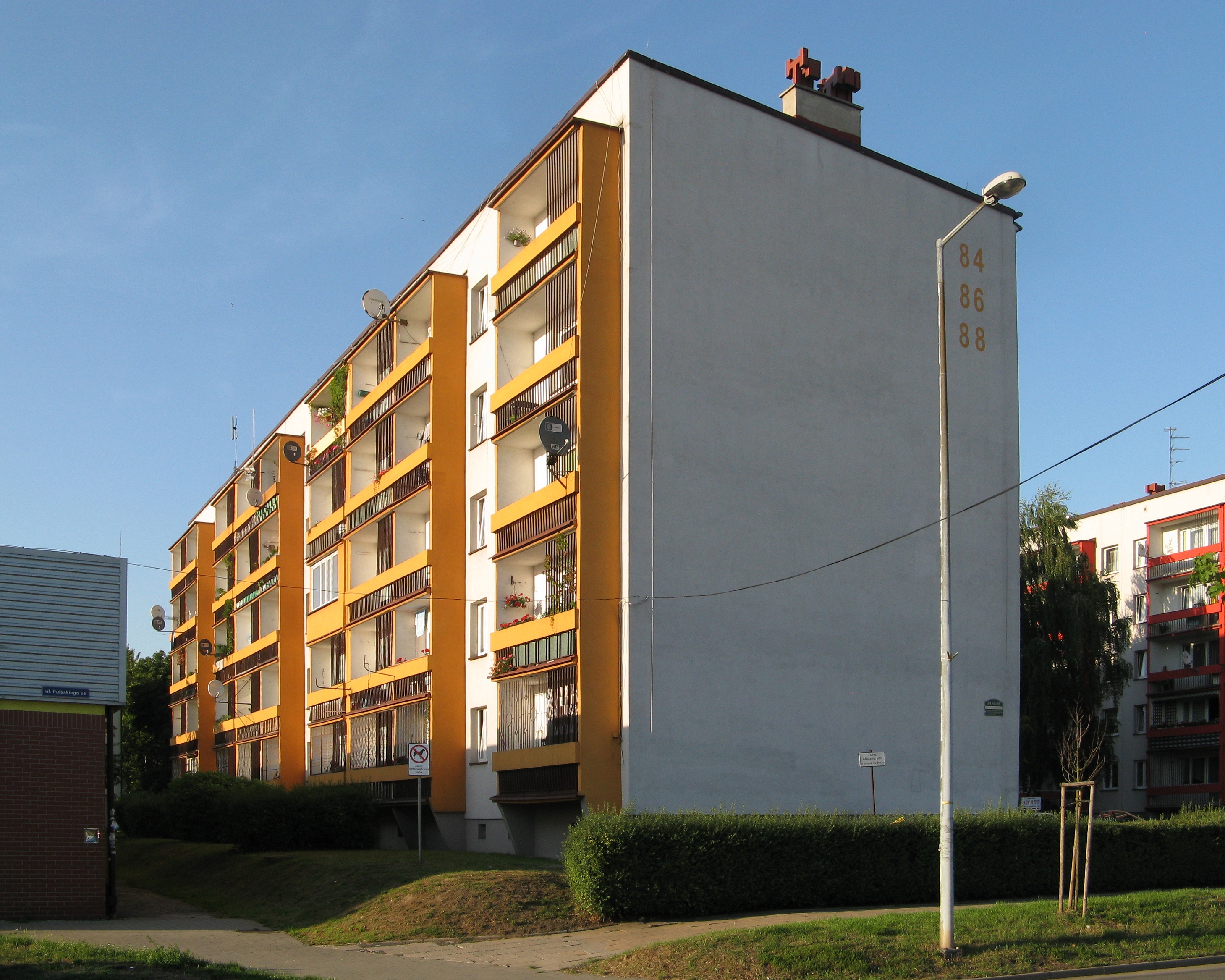 Blok przy ulicy Kazimierza Pułaskiego 84, 86, 88, pod numerem 88/7 siedziba klubu Zefir Bytom.